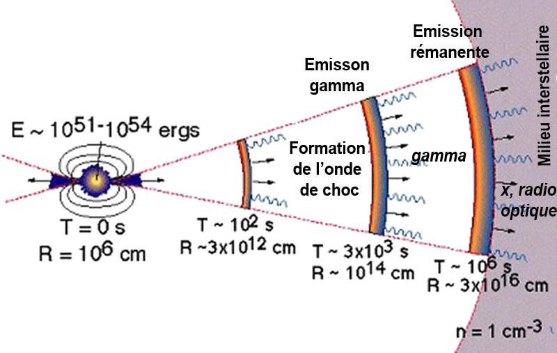 Sursaut gamma : schéma du modèle de la boule de feu